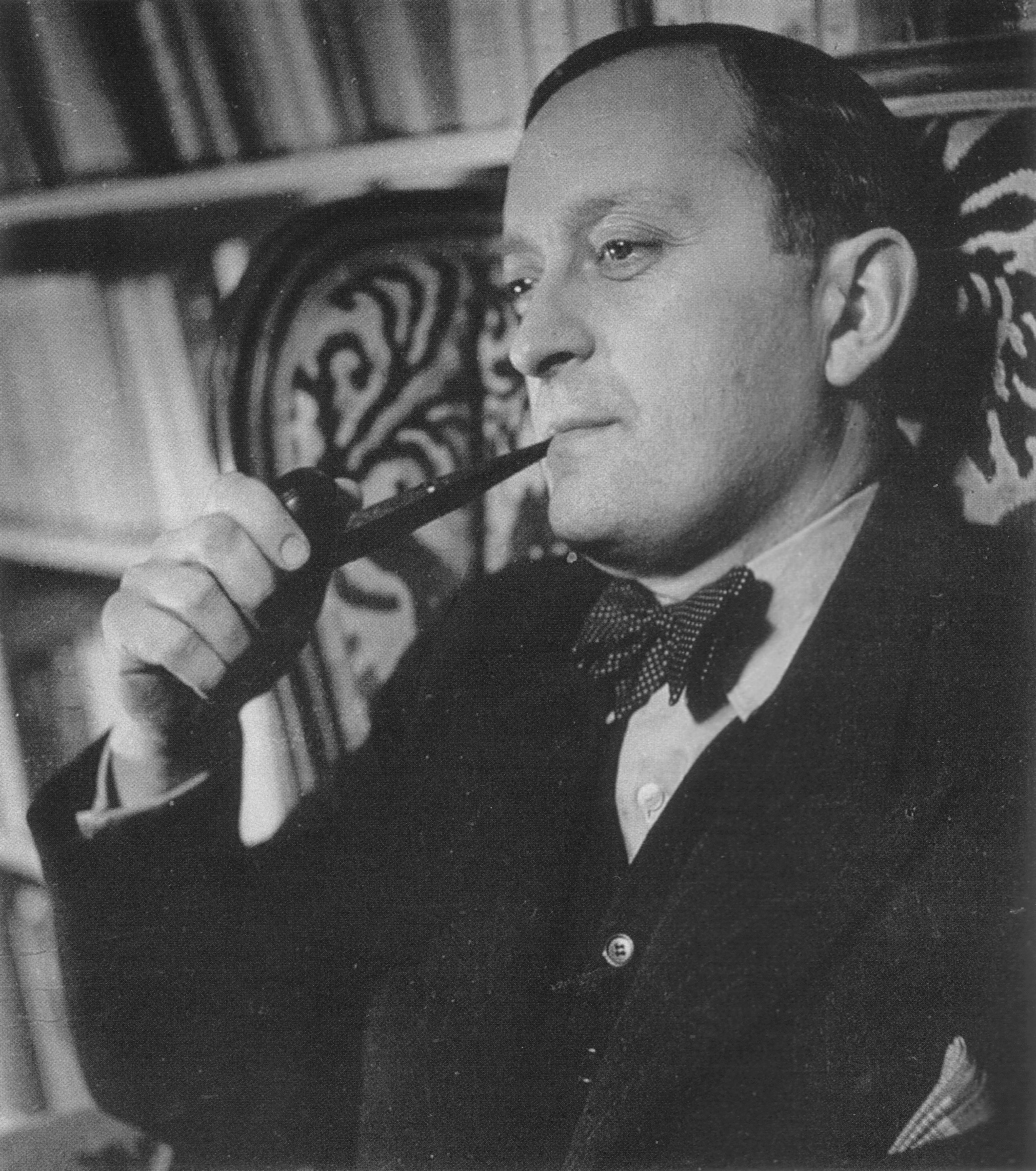 Folke Lindberg